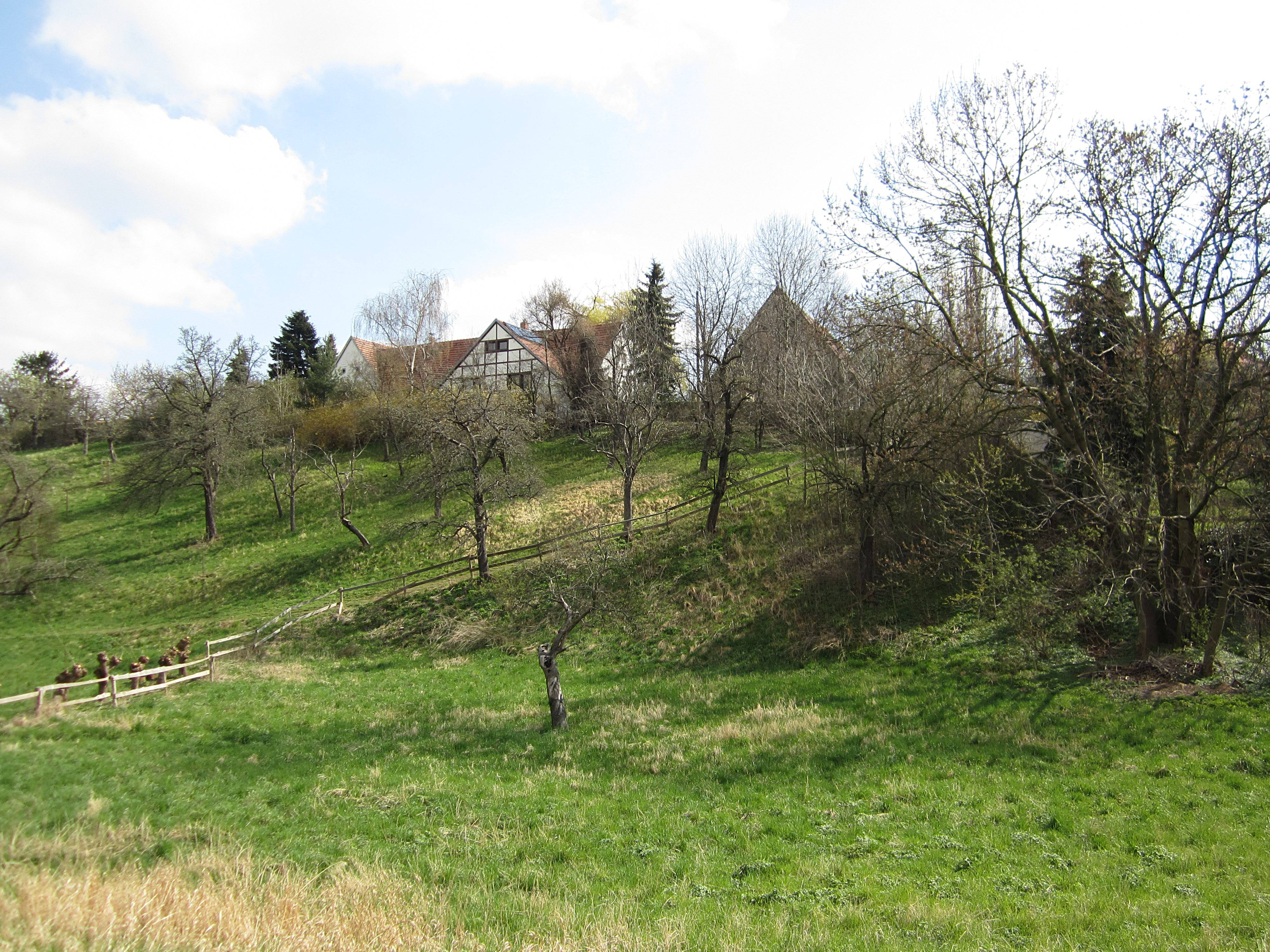 Omsewitzer Grund, oben die Häuser von Altburgstädtel